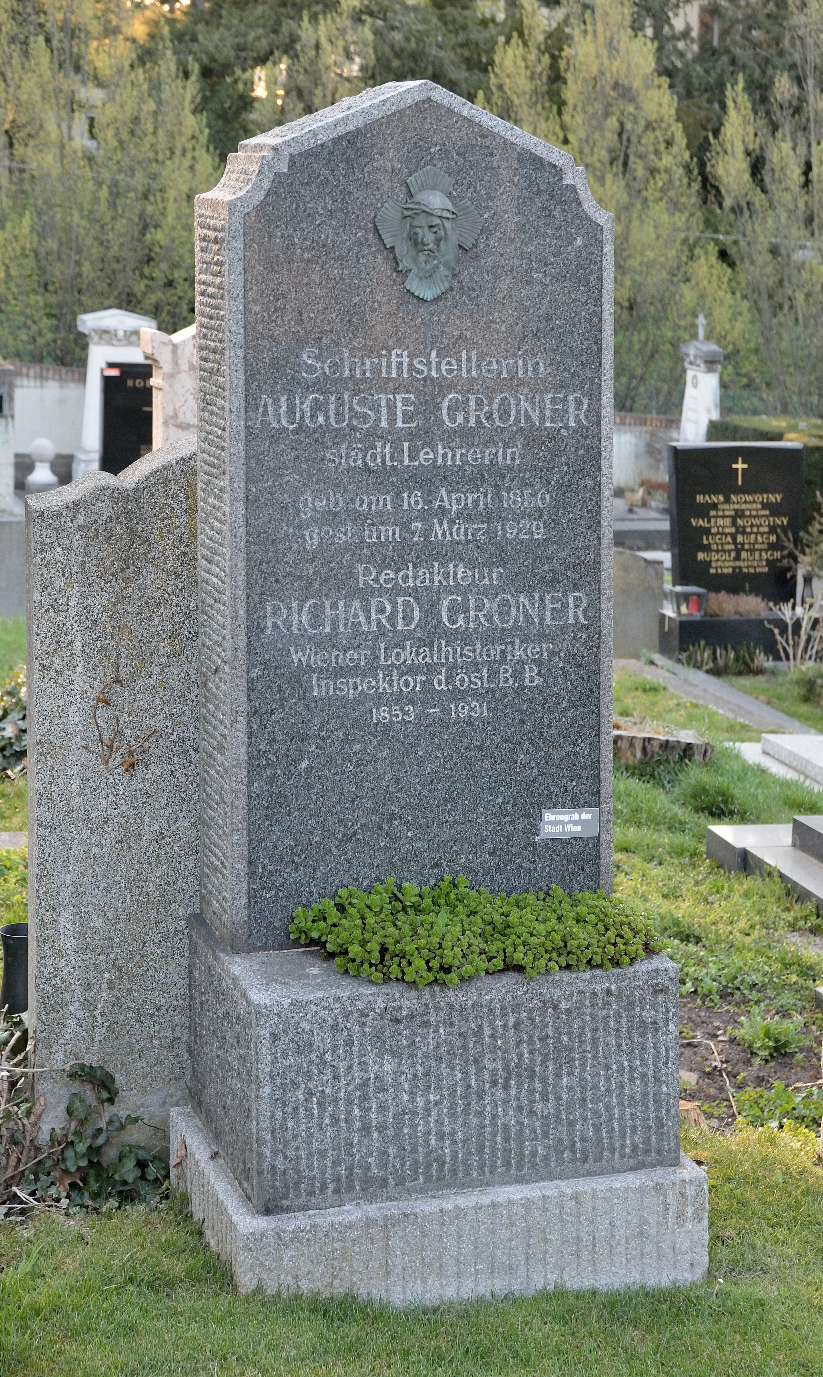 Das Grabmal von Auguste (Augustine lt. Bestattung Wien) und Richard Groner ist für beide als ehrenhalber gewidmetes Grab ausgewiesen. Es liegt auf dem Hietzinger Friedhof in der Gruppe 4, Nr. 88.